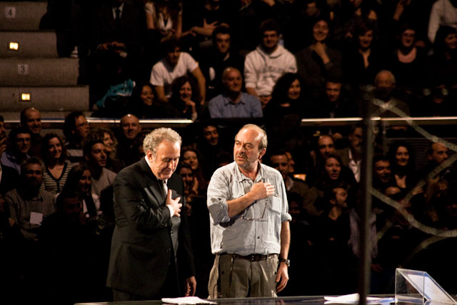 Raiperunanotte: "Giuro di farla sempre fuori dal vaso", finale-parodia del giuramento in Piazza Navova..